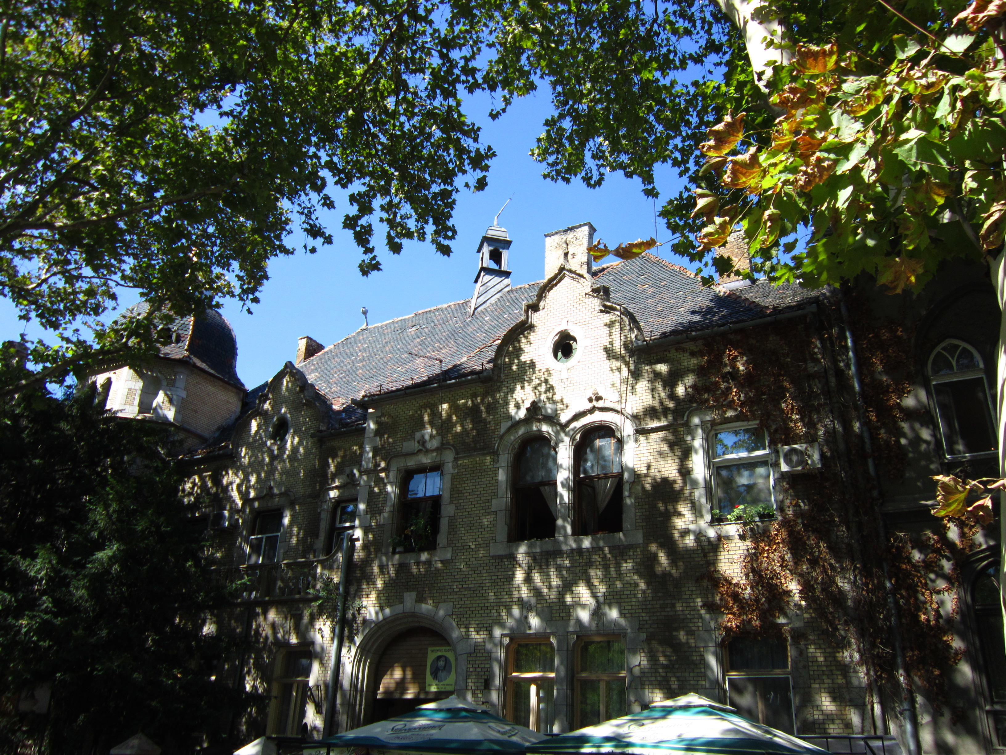 Зграда у парку Рајхл Ференца бр.11 , Суботица